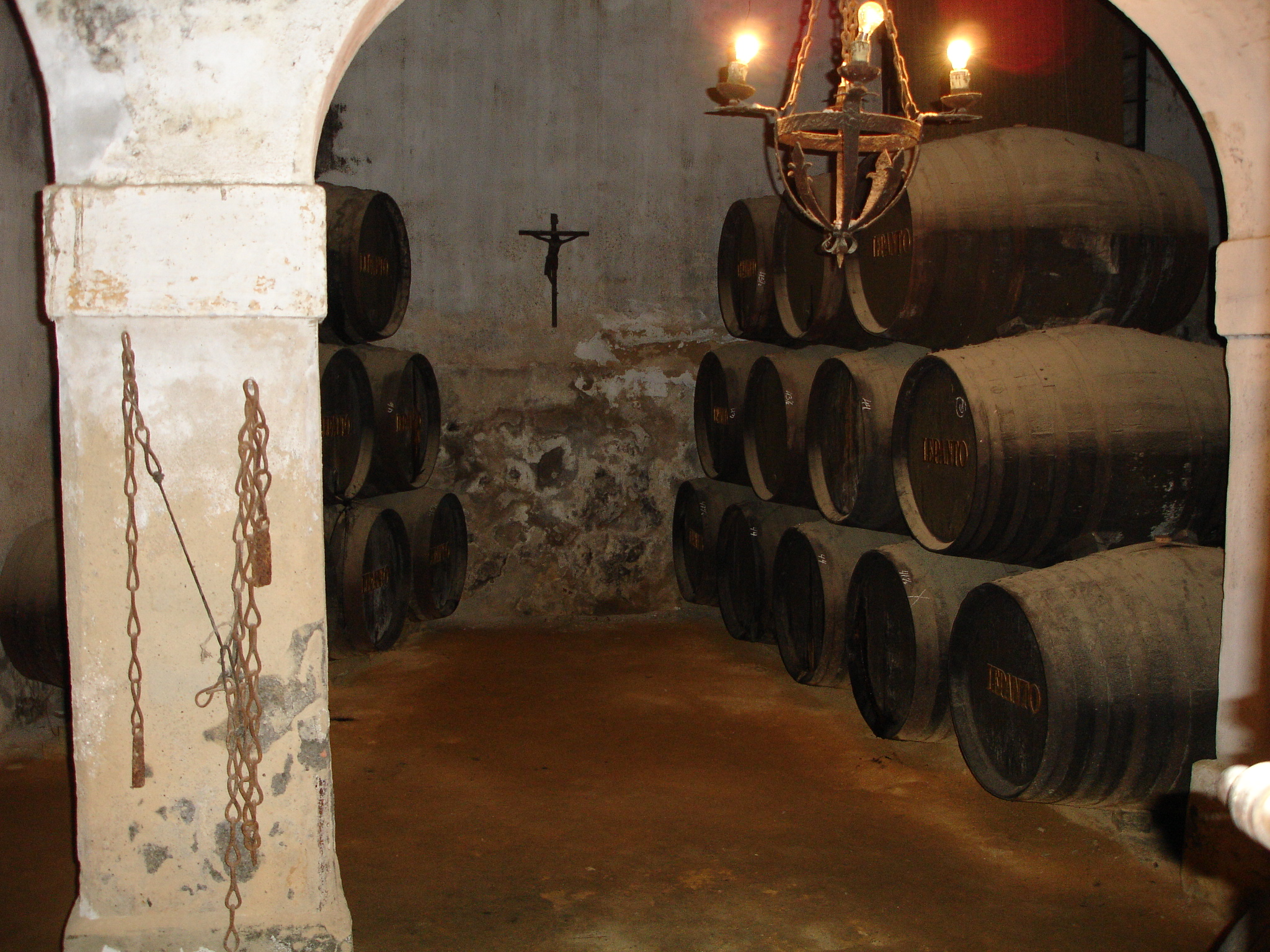 Bodegas Tío Pepe